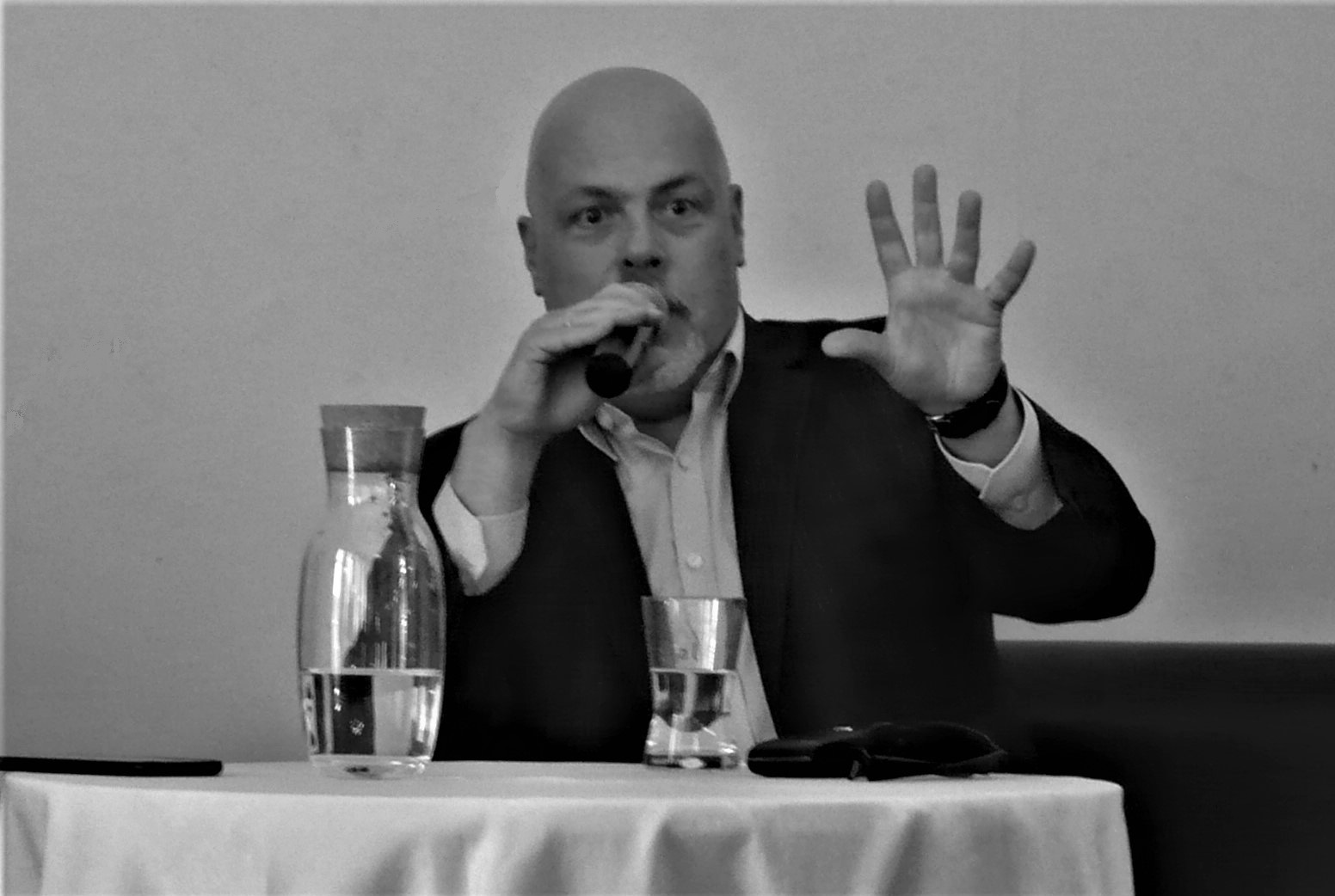 Marek Krajewski, Festiwal Góry Literatury, Zamek Książ, 14.07.2019